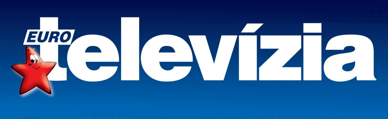 Logo týždenníka Eurotelevízia